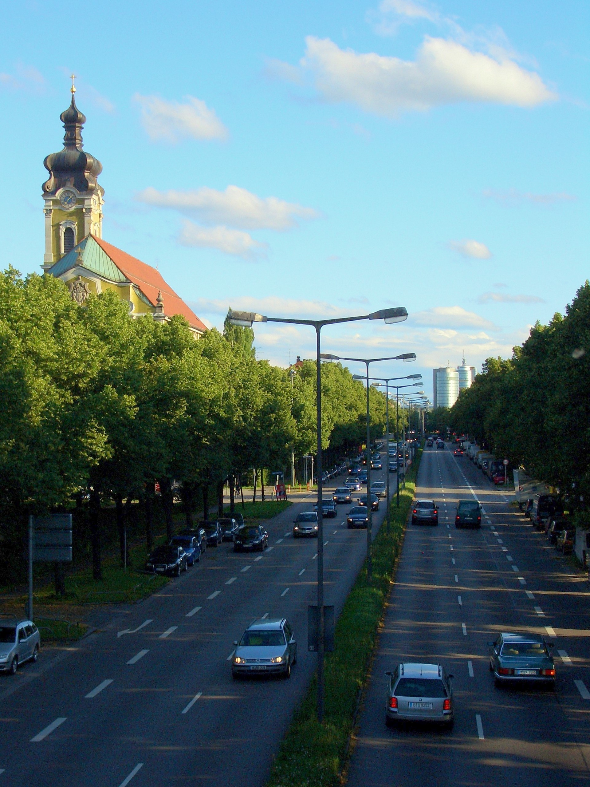 Landshuter Allee in München nach Süden; links: St. Theresia; im Hintergrund: Hochhäuser an der Donnersbergerbrücke